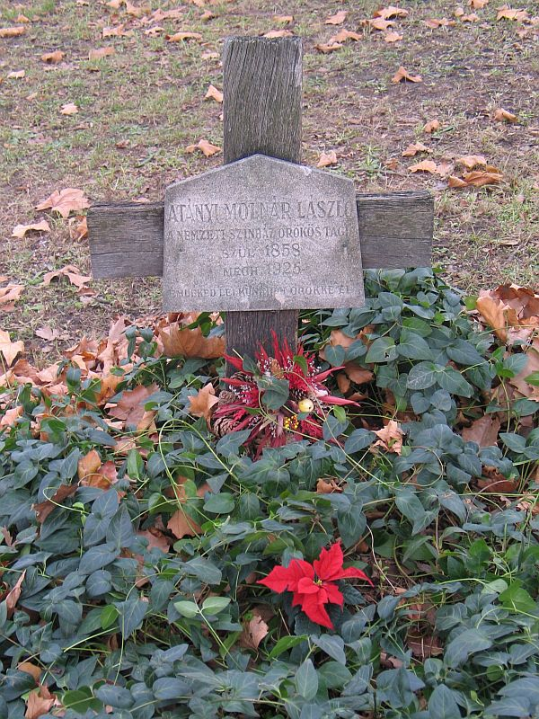 Átányi Molnár László sírja Budapesten. Kerepesi temető: 45-1-105.